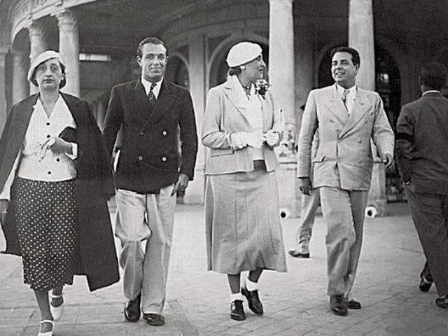 Borges en la rambla de Mar del Plata, en marzo de 1935, junto a Josefina Dorado, Bioy Casares y Victoria.